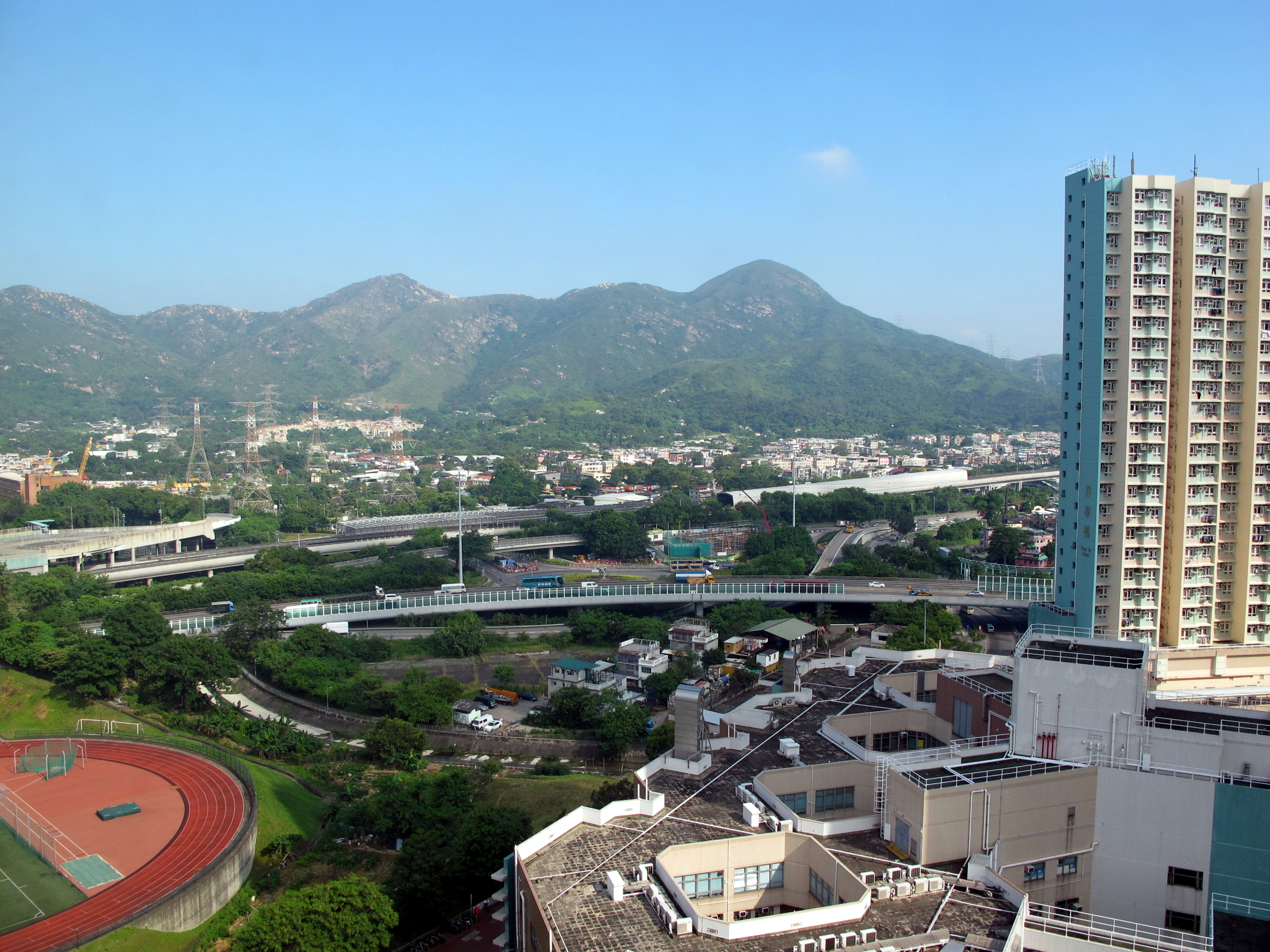 Lam Tei 藍地